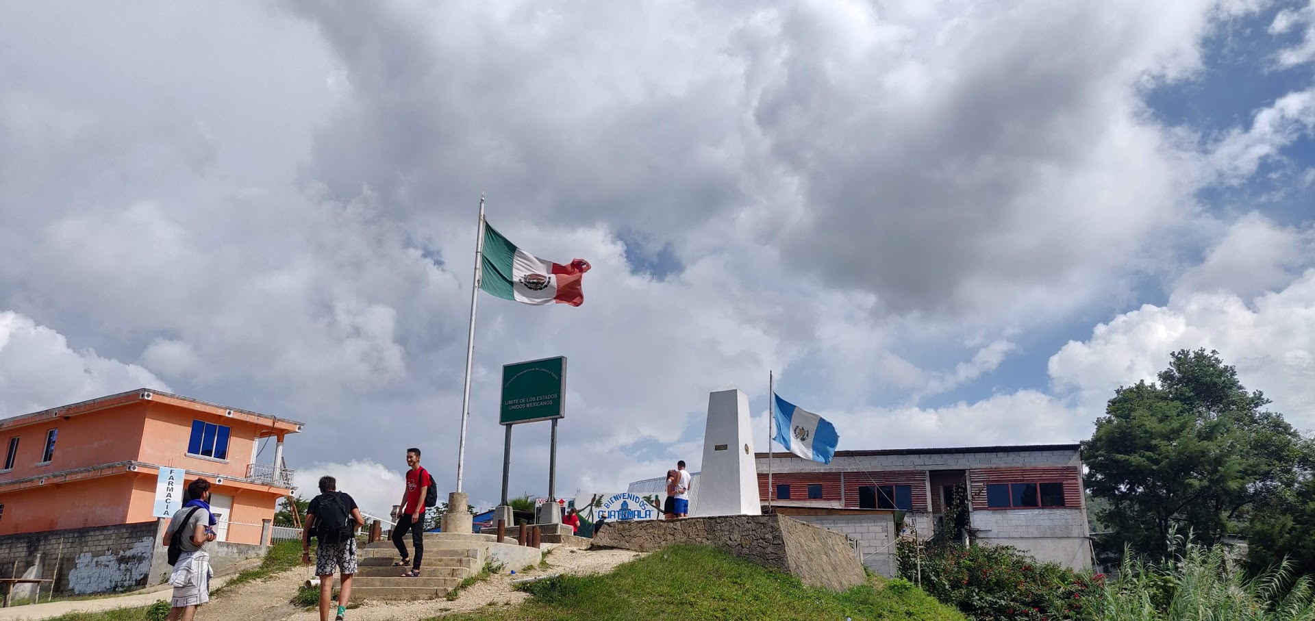 Frontera entre Mèxic i Guatemala del costat mexicà. La farmàcia que es veu al fons ja forma part de Guatemala.